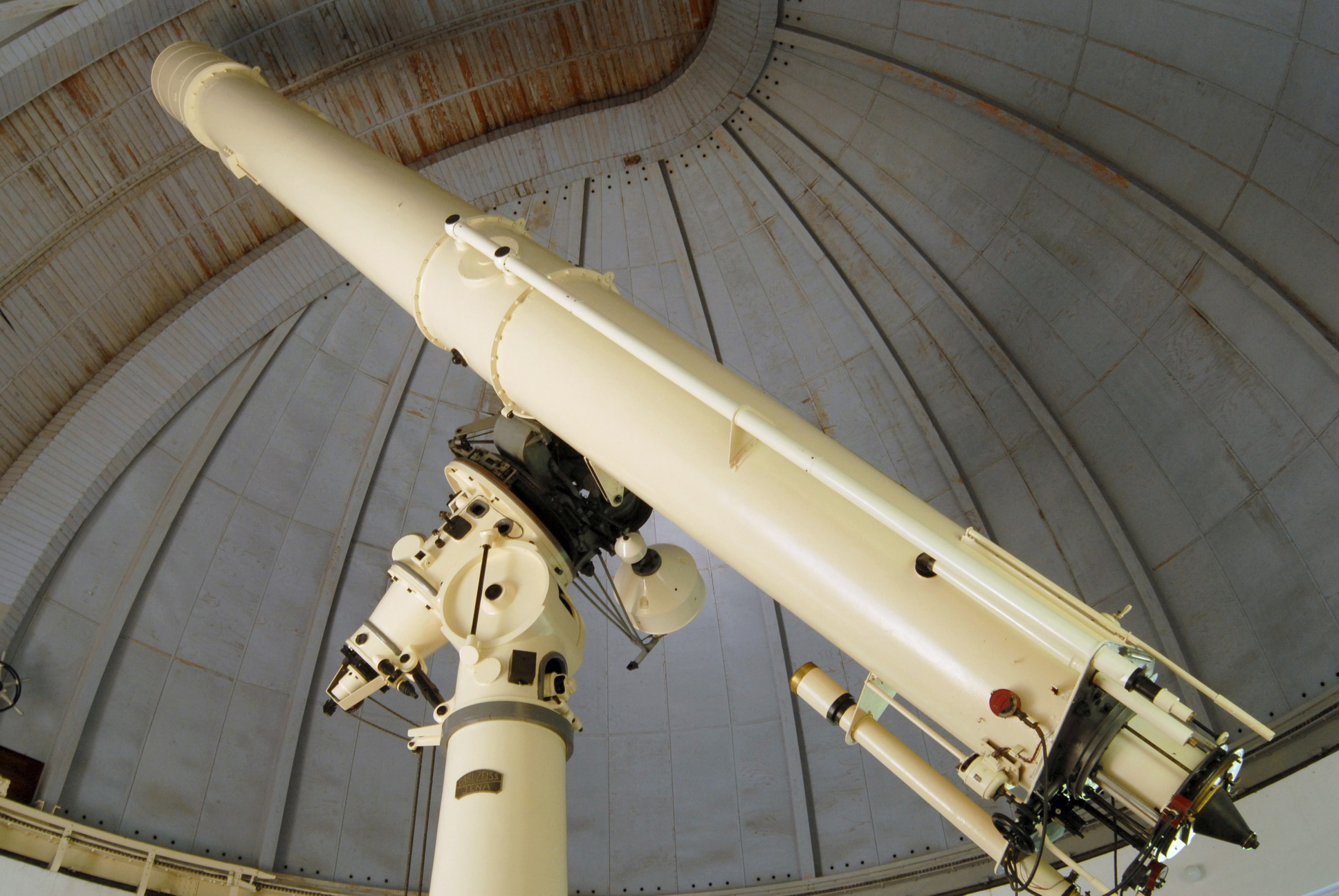 Autor by Snežana Negovanović